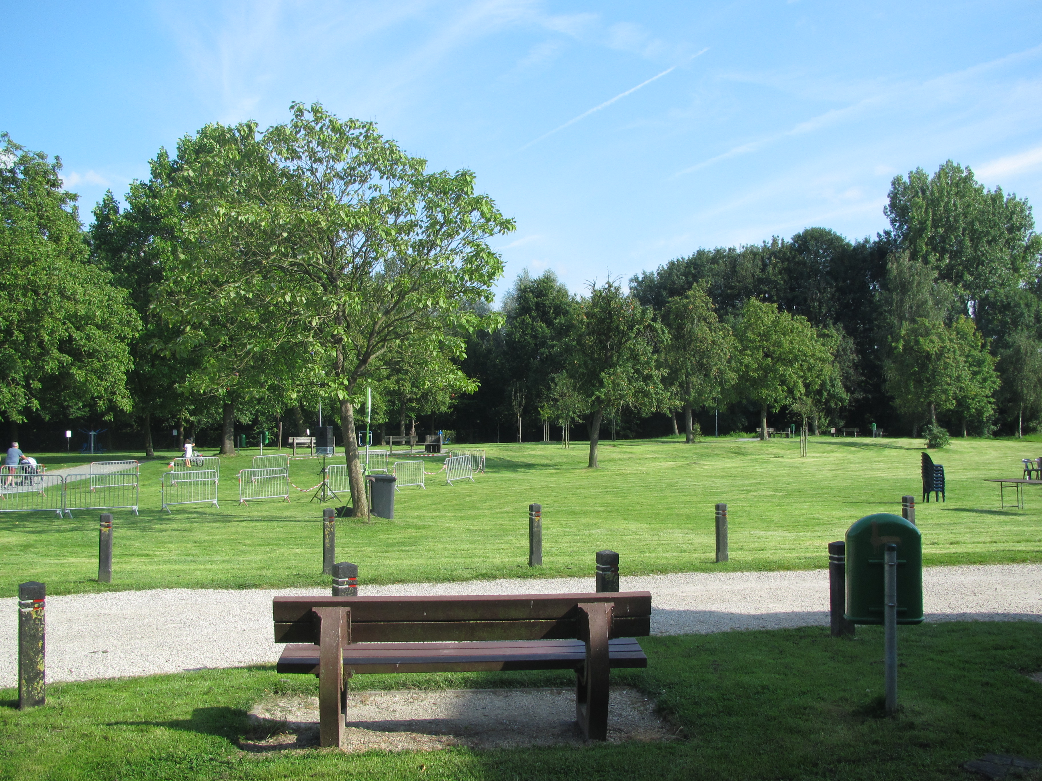 Het park gelegen achter het Hof Ten Hemelrijk, waar de zegening van de paarden plaatsvindt op het einde van de Sint-Pauluspaardenprocessie